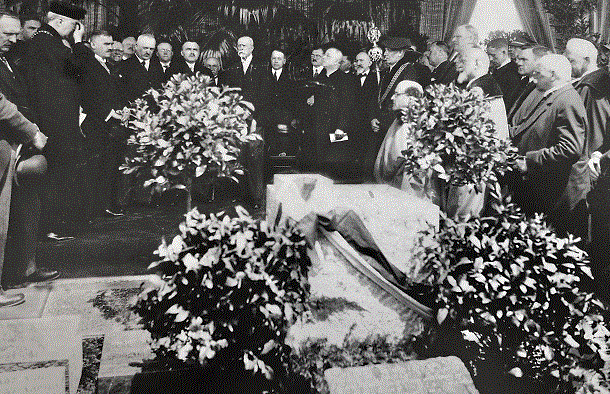 Slavnostní kladení základního kamene Právnické fakulty Masarykovy univerzity v Brně 9. června 1928